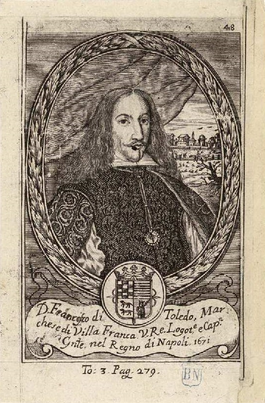 Retrato de Don Fadrique de Toledo Osorio y Ponce de León (1635-1705), VII marqués de Villafranca, grande de España y virrey de Nápoles, recogido en el libro Teatro eroico, e politico de governi di Vicere del Regno di Napoli Dal tempo del Re Ferdinando il Cattolico Fino al presente, de Domenico Antonio Parrino (1694)